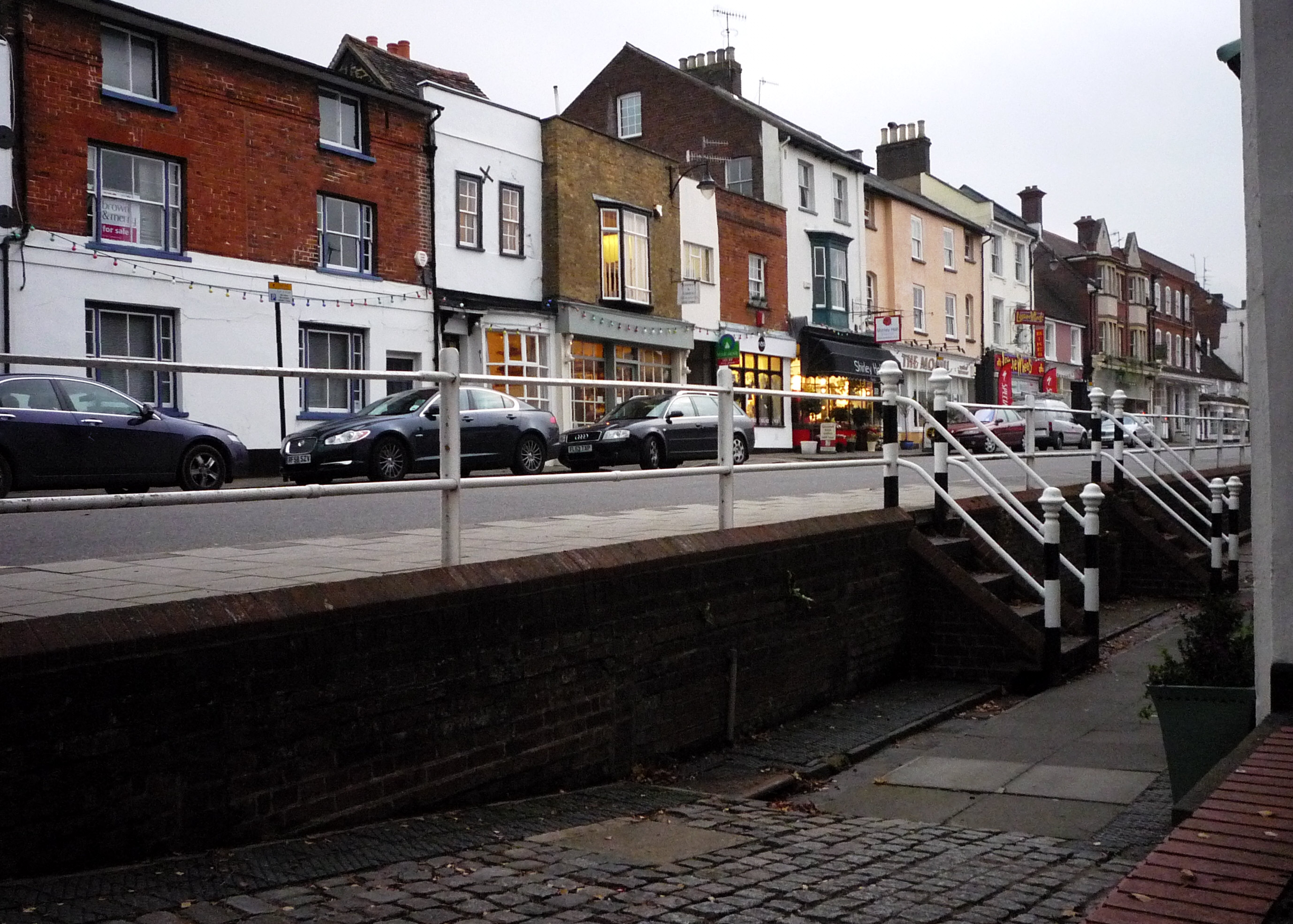 Die High Street im historischen Bereich von Hemel Hempstead